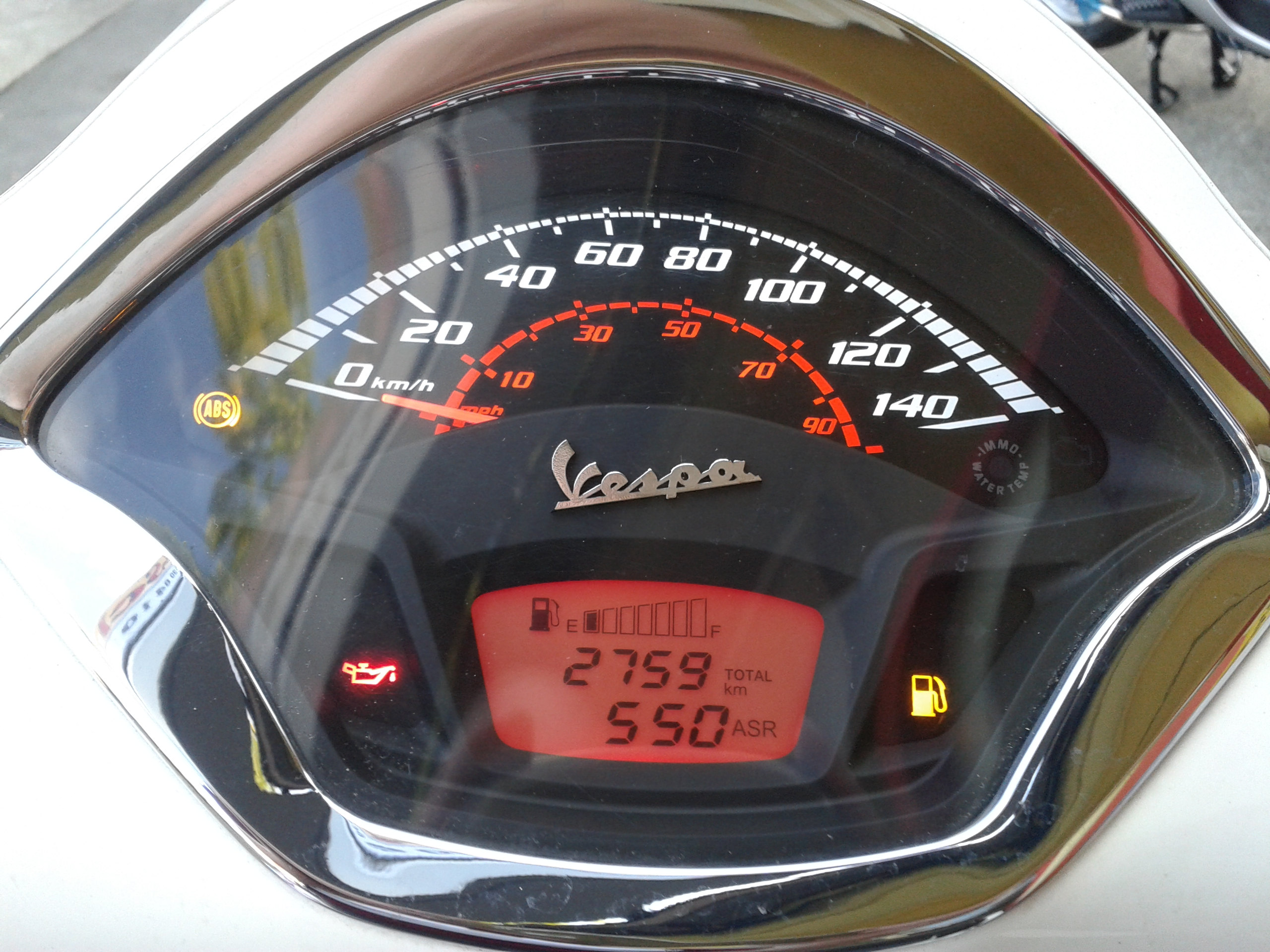 Cockpit Vespa GTS 300 Super ABS/ASR E4 Modell 2018